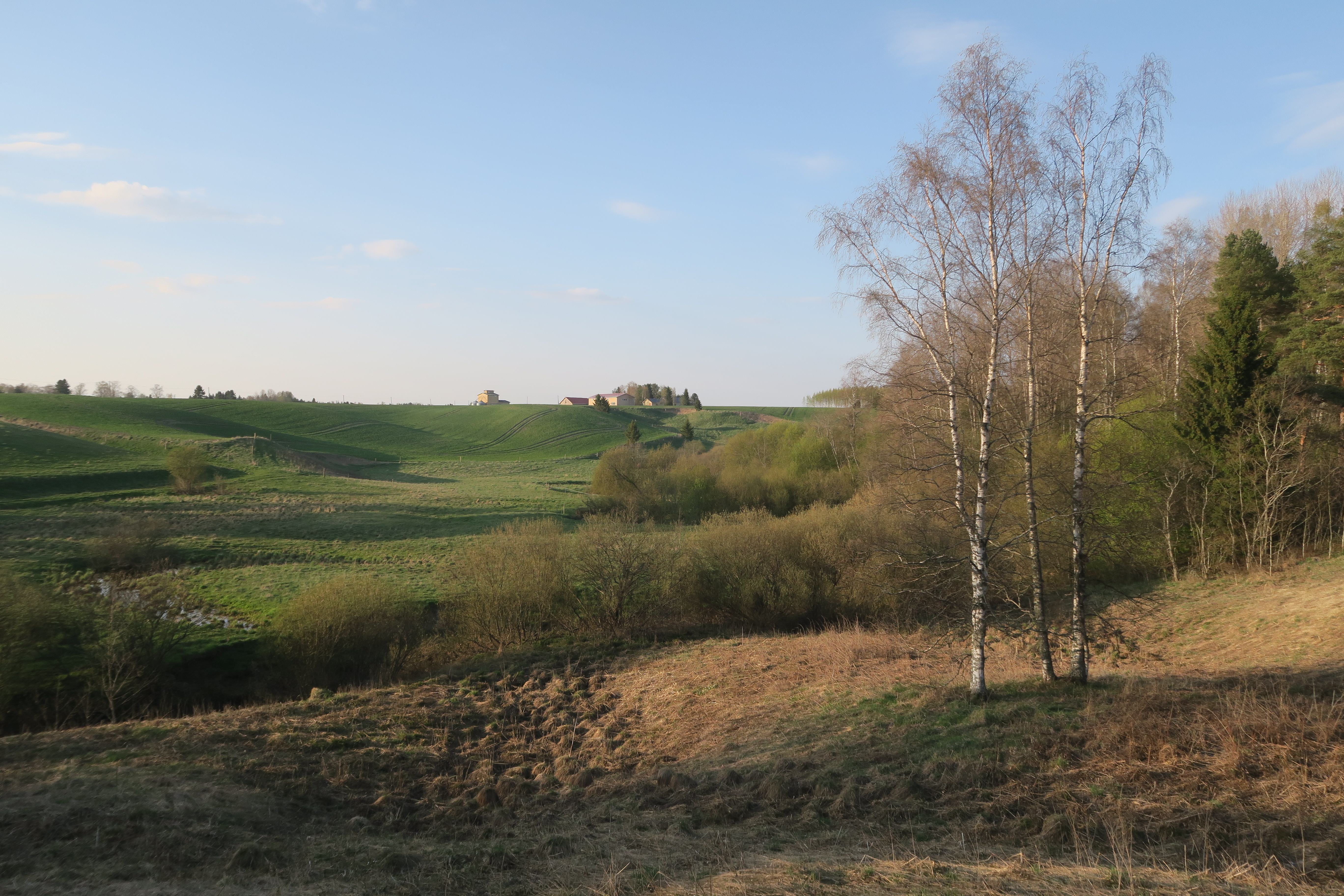 Uskelanjoen sivujoen Terttilänjoen notkoa Kiikalan Revän kylässä Salossa Varsinais-Suomessa. Taustalla Revän talon rakennuksia Kiikalan Revän kylän historiallisella kylätontilla.